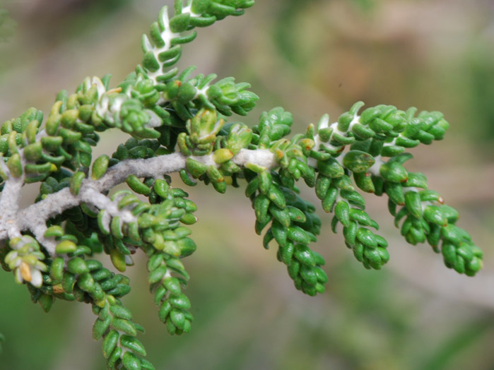 Passerine hirsute, Bonifacio (Corse)